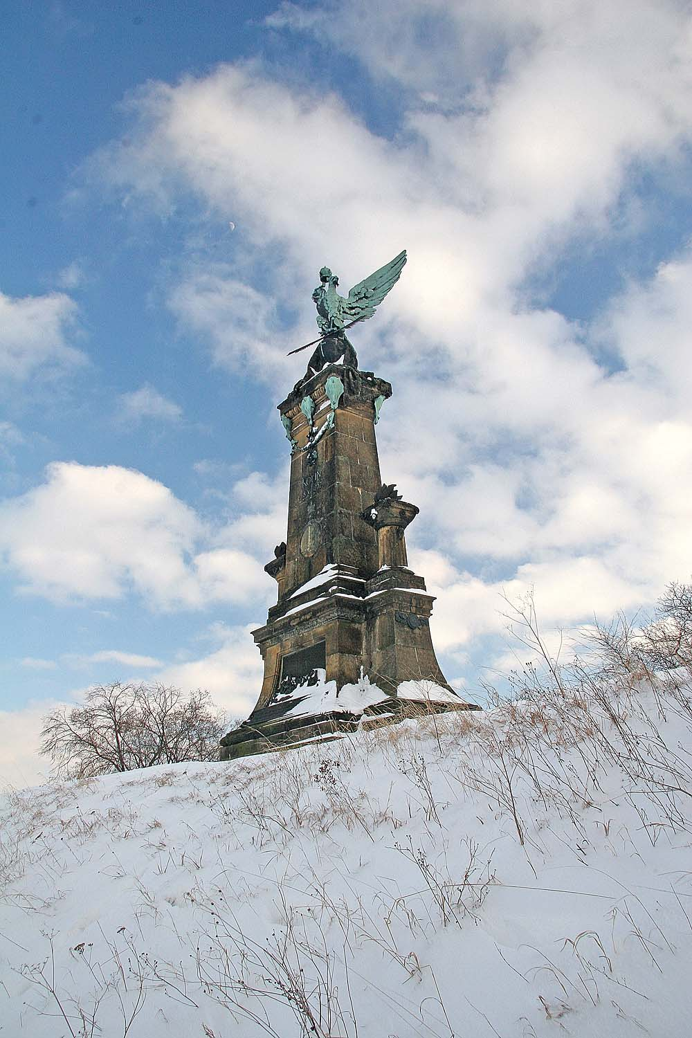 Památník bitvy u Kolína 18. června 1757. district Kolín